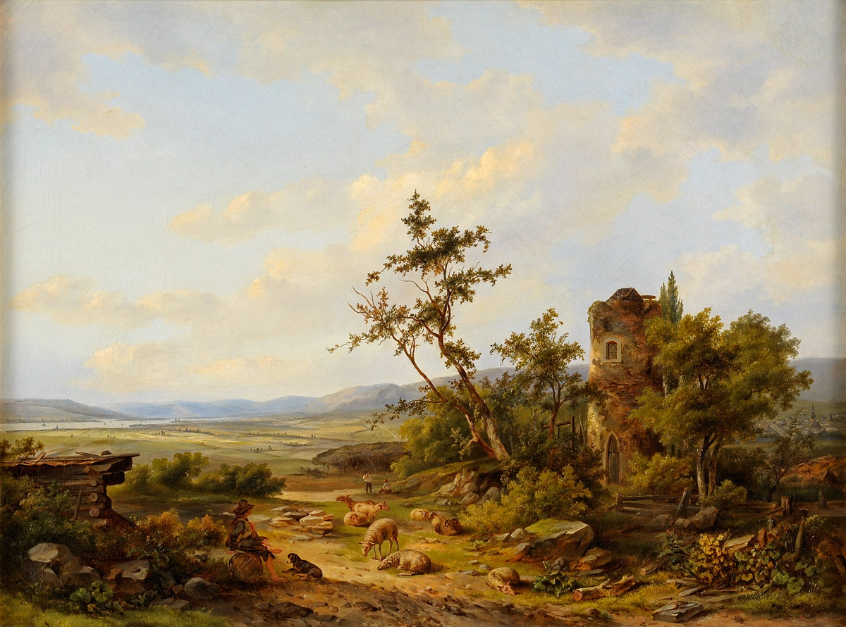 Weite Landschaft mit Burgruine. Signiert. Datiert 1847. Öl/Lwd., 68 x 94 cm.